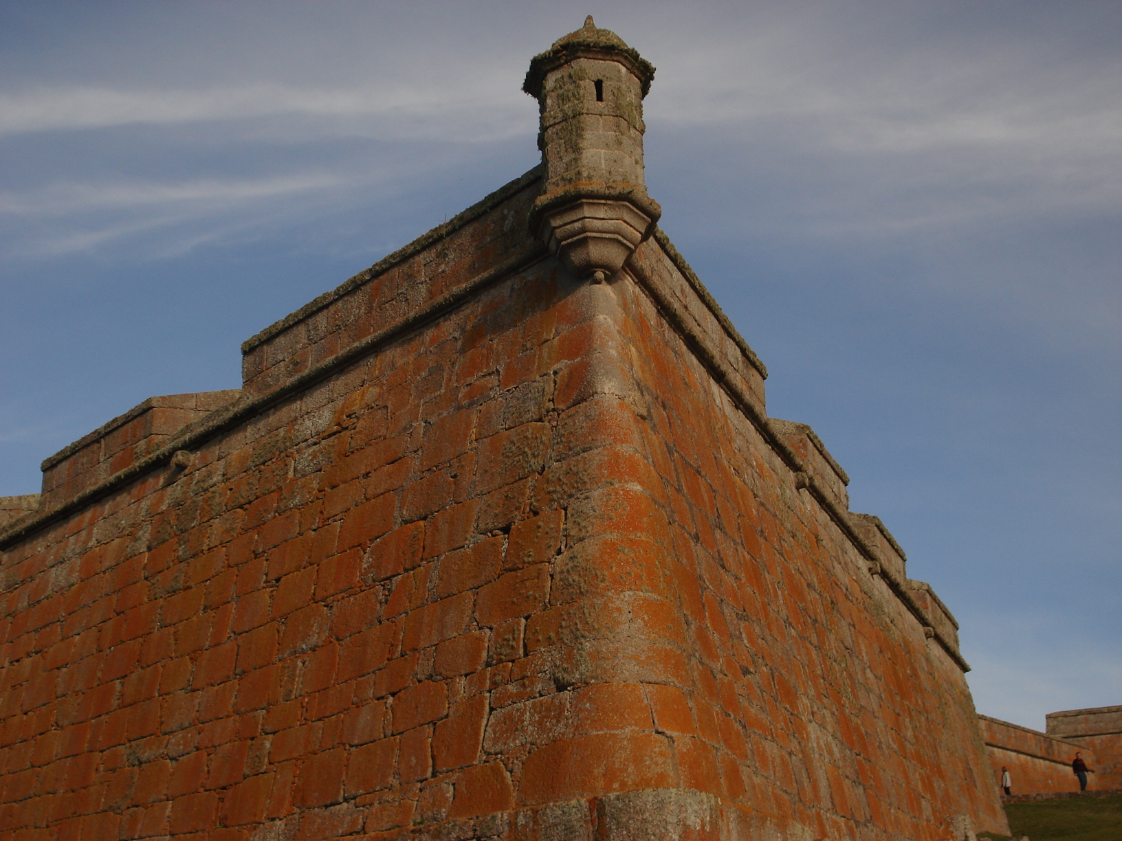 Fortaleza de Santa Tereza, Uruguai